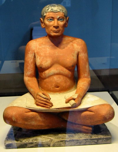 Antiquité égyptienne, Musée du Louvre, pavillon sully, 2002 Source : Greudin